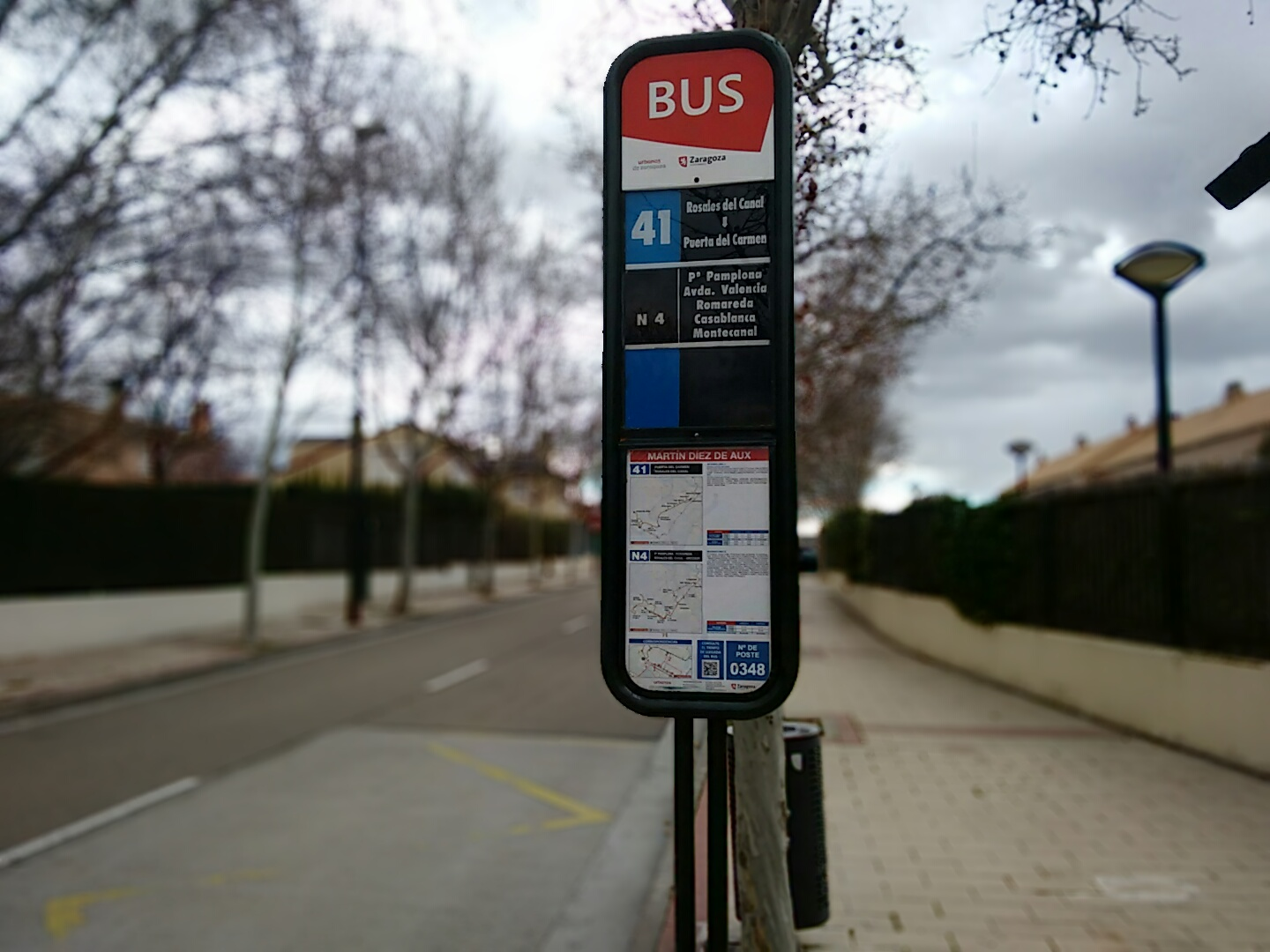 Parada de bus de Auzsa en la calle Martín Diez de Aux.